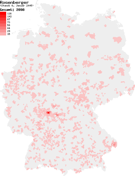 Verteilung des Nachnamens Rosenberger in Deutschland nach dem Telefonbuch mit Stand vom 6. Januar 2005